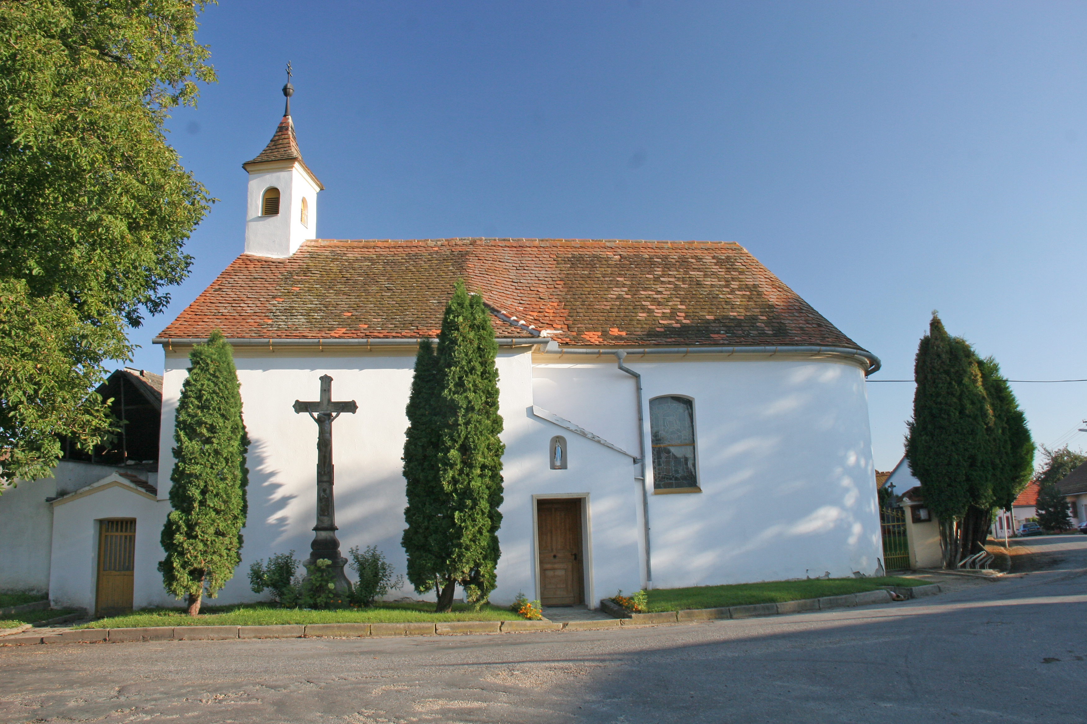 Kostel Nanebevzetí Panny Marie, Milíčovice.